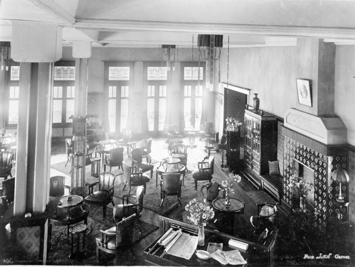 Foto. Het interieur van het hotel te Tjisoeroepan.